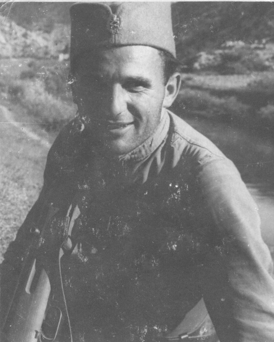 Srpskohrvatski / српскохрватски: Četnički vojvoda Mane Rokvić